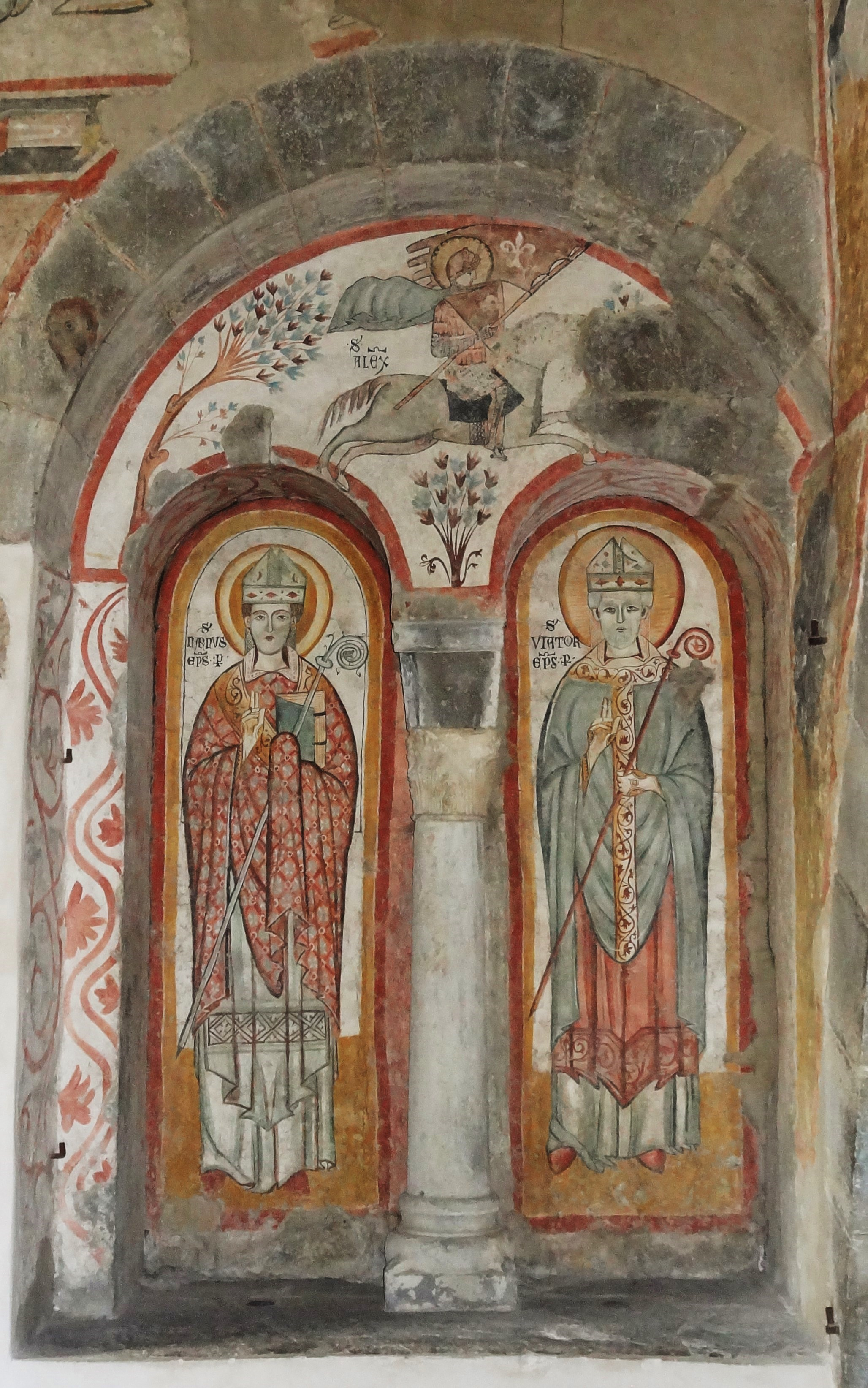 Bergamo, Fresko in der Cappella di Santa Croce-San Narno e San Viatore